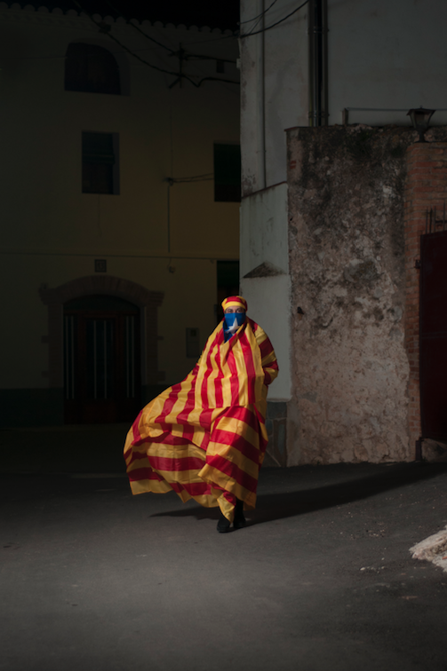 Fotografia sobre metacrilat